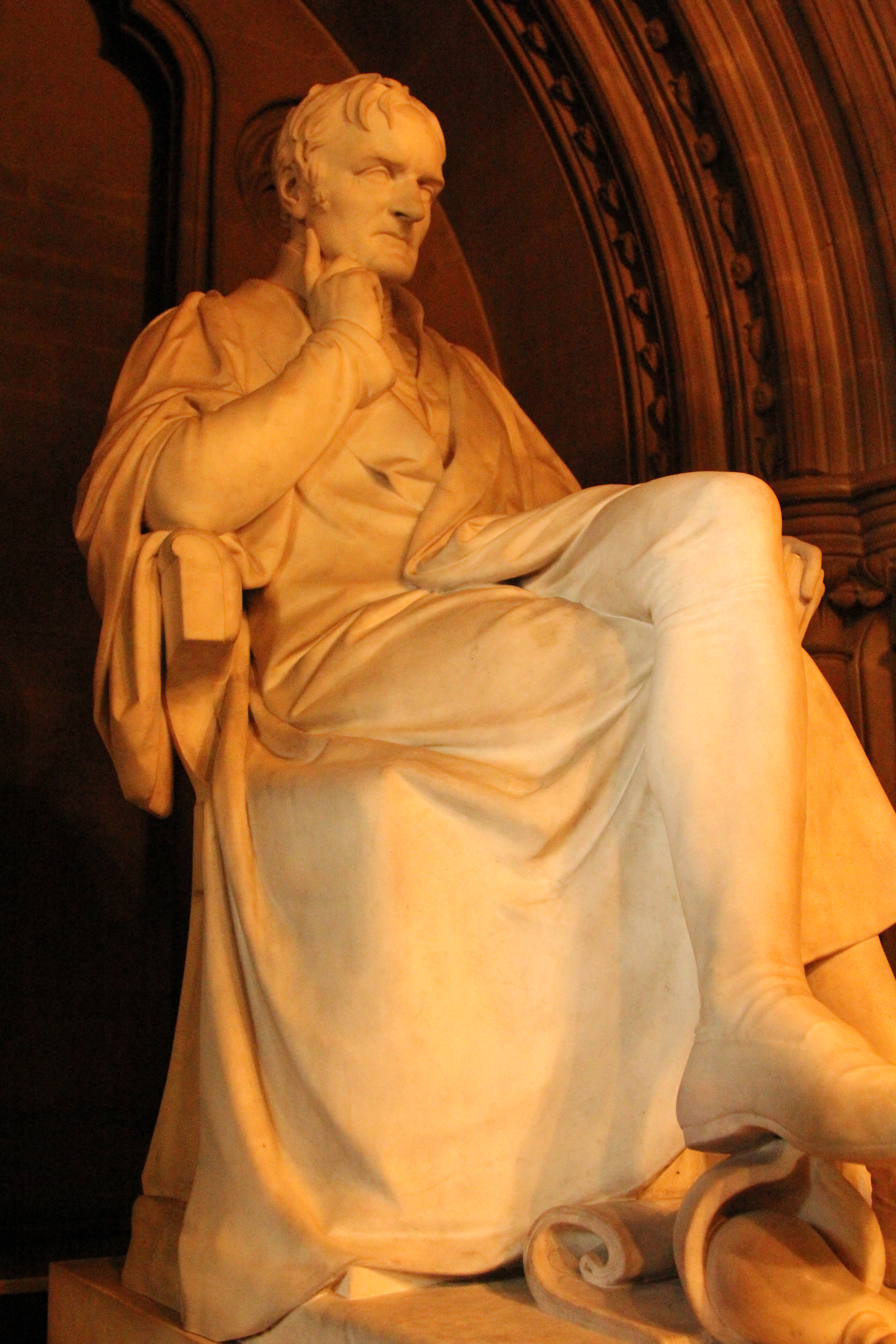 Posąg John'a Daltona w w Manchester Town Hall.